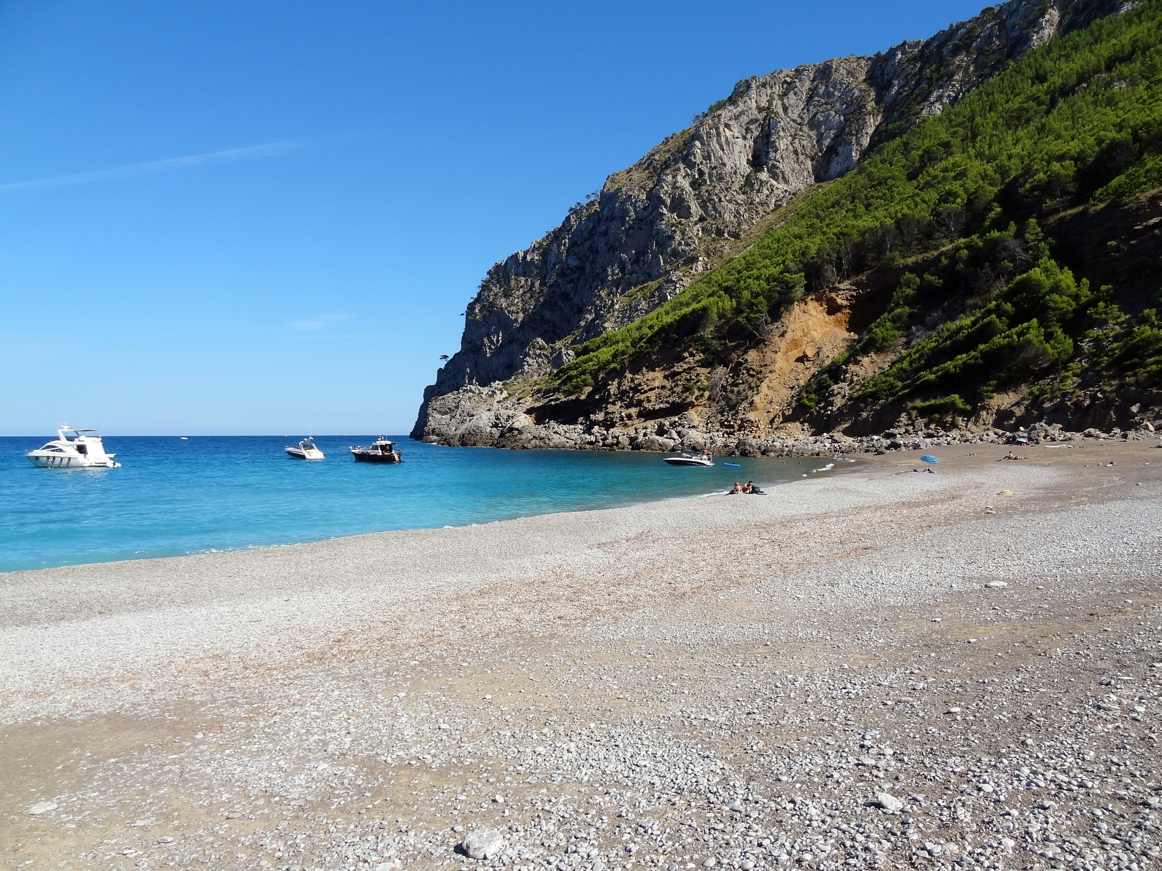 Platja des Coll Baix, Strand auf der Halbinsel Victòria in der Gemeinde Alcúdia, Mallorca, Spanien